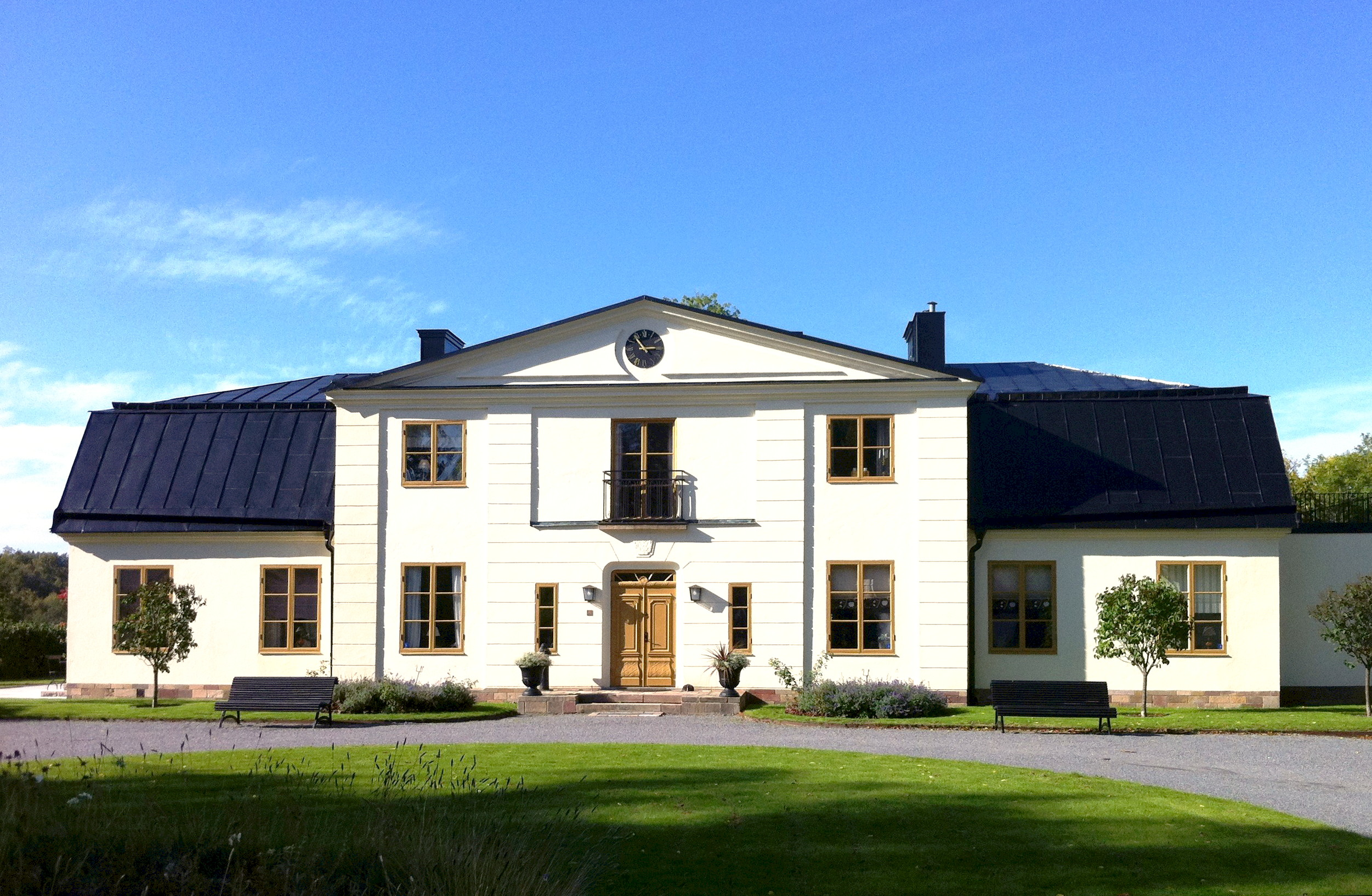 Siggesta gård, Värmdö, september 2011, huvudbyggnad